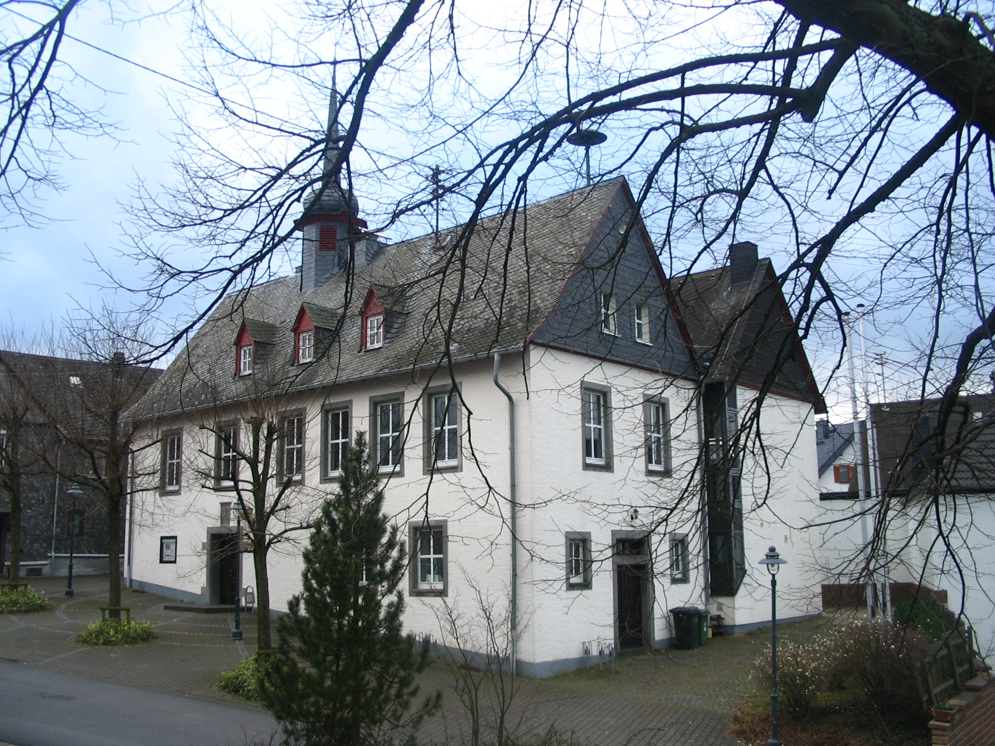 Gemeindehaus Uhler im Hunsrück